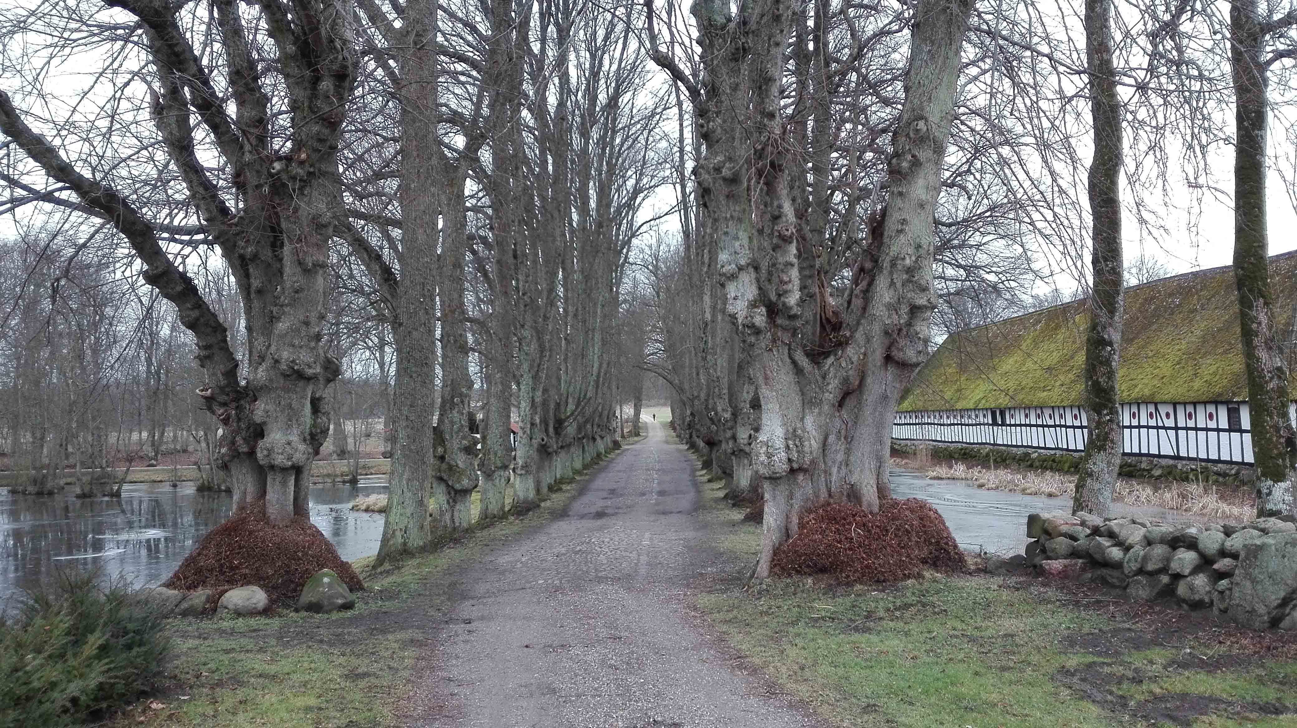 Alle langs vestsiden af Trudsholm